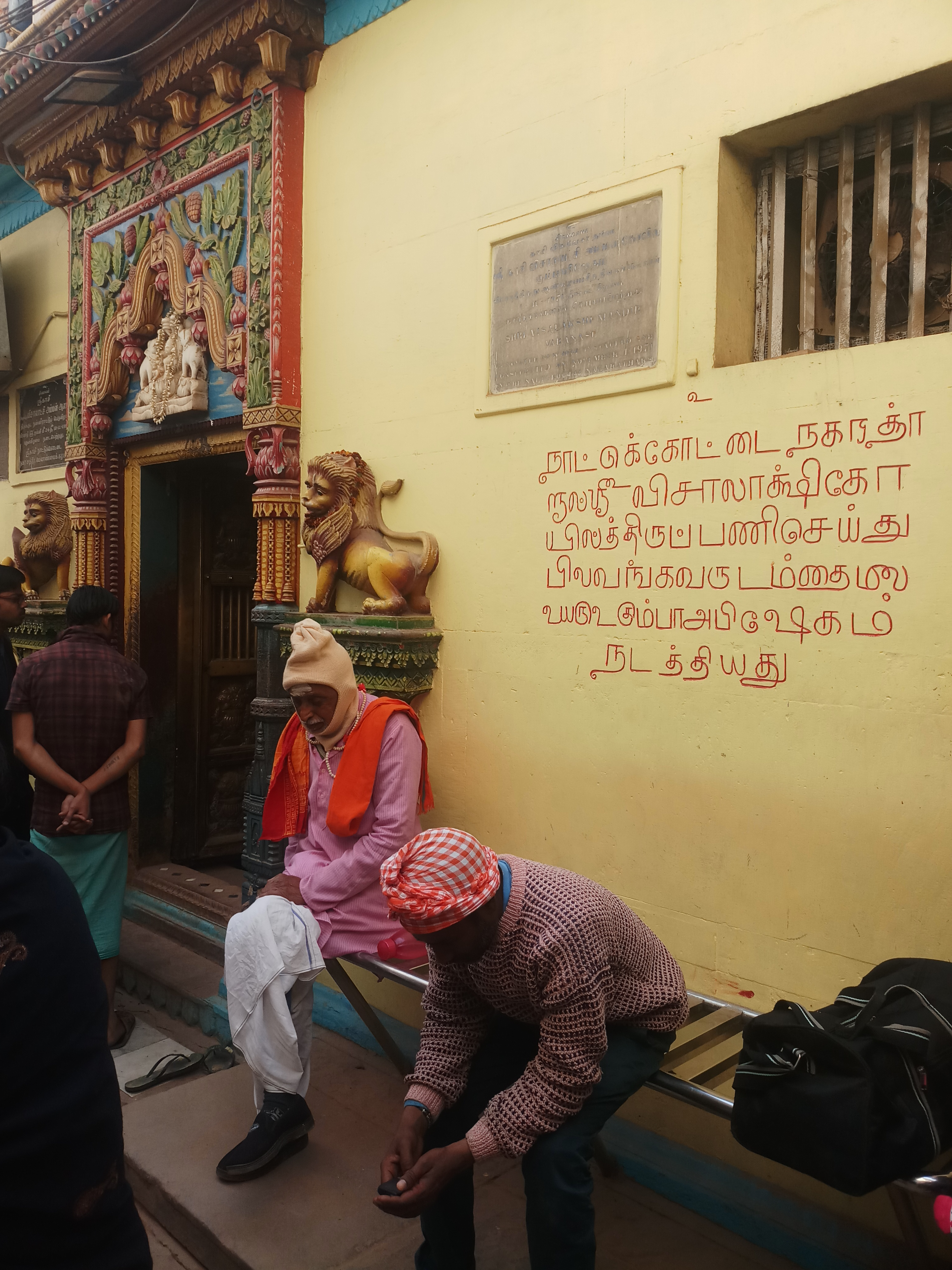 காசி விசாலாட்சி கோயில் நாட்டுக்கோட்டை நகரத்தாரால் 1893இல் கட்டப்பட்டது. 1908இல் குடமுழுக்கு செய்யப்பட்டுள்ளது இதை தமிழில் கோயில் சுவற்றில் அன்றே பதிவு செய்துள்ளார்கள்.